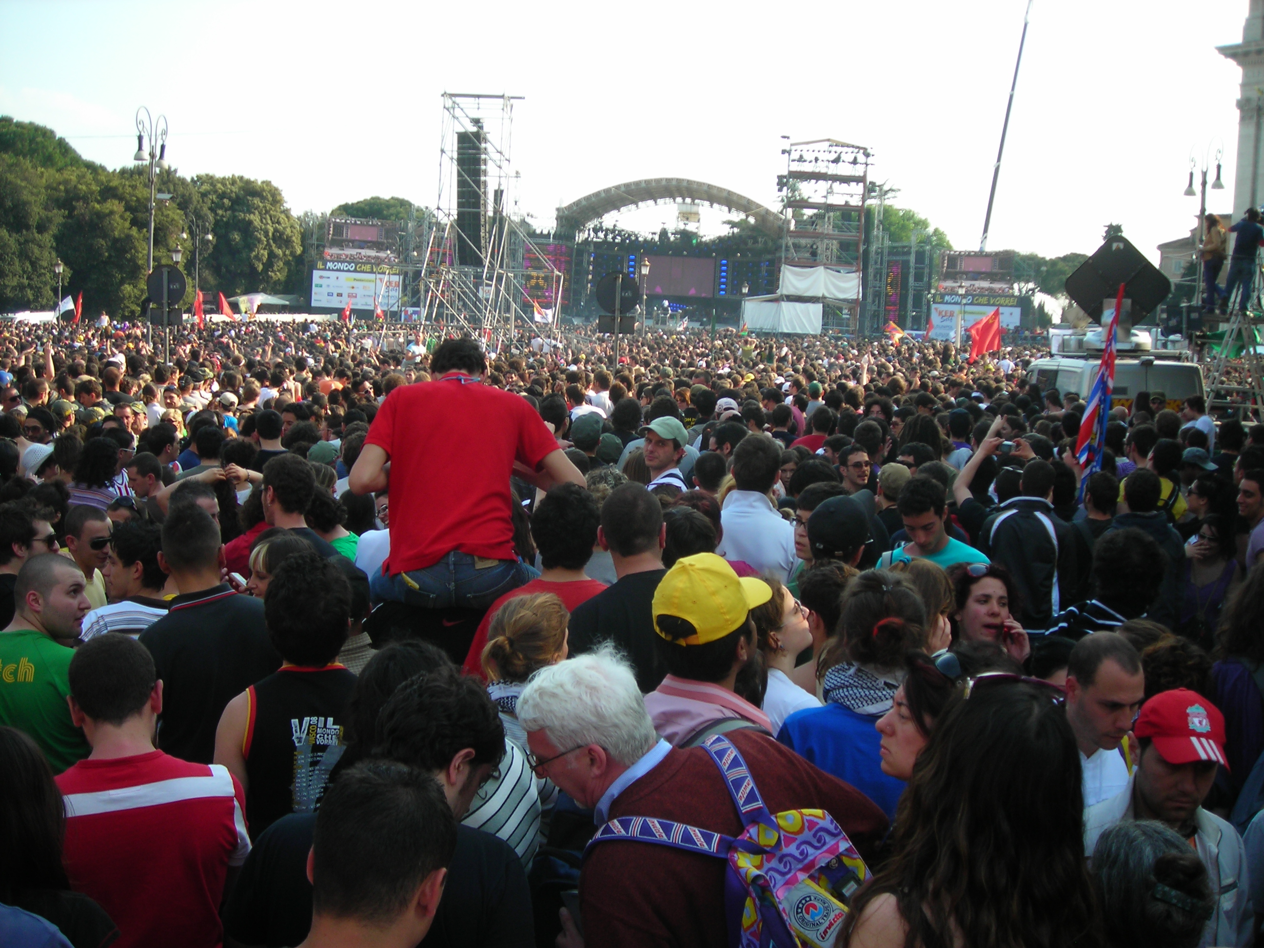 Il Concerto del Primo Maggio del 2009 in Piazza di Porta San Giovanni a Roma.